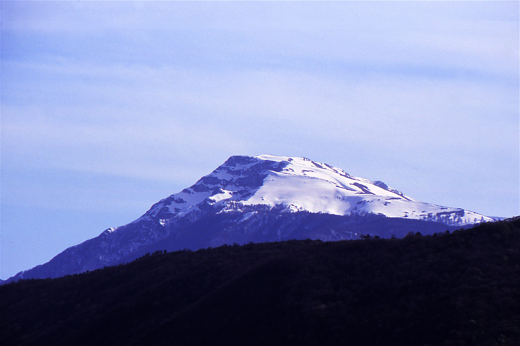 Il Monte Viglio - versante marsicano visto da Avezzano